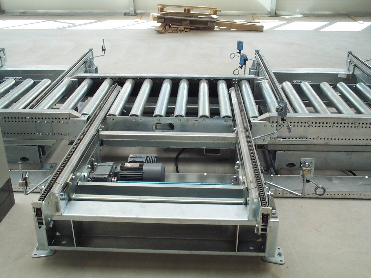 Kettenförderer in der Vorzone eines Hochregallagers